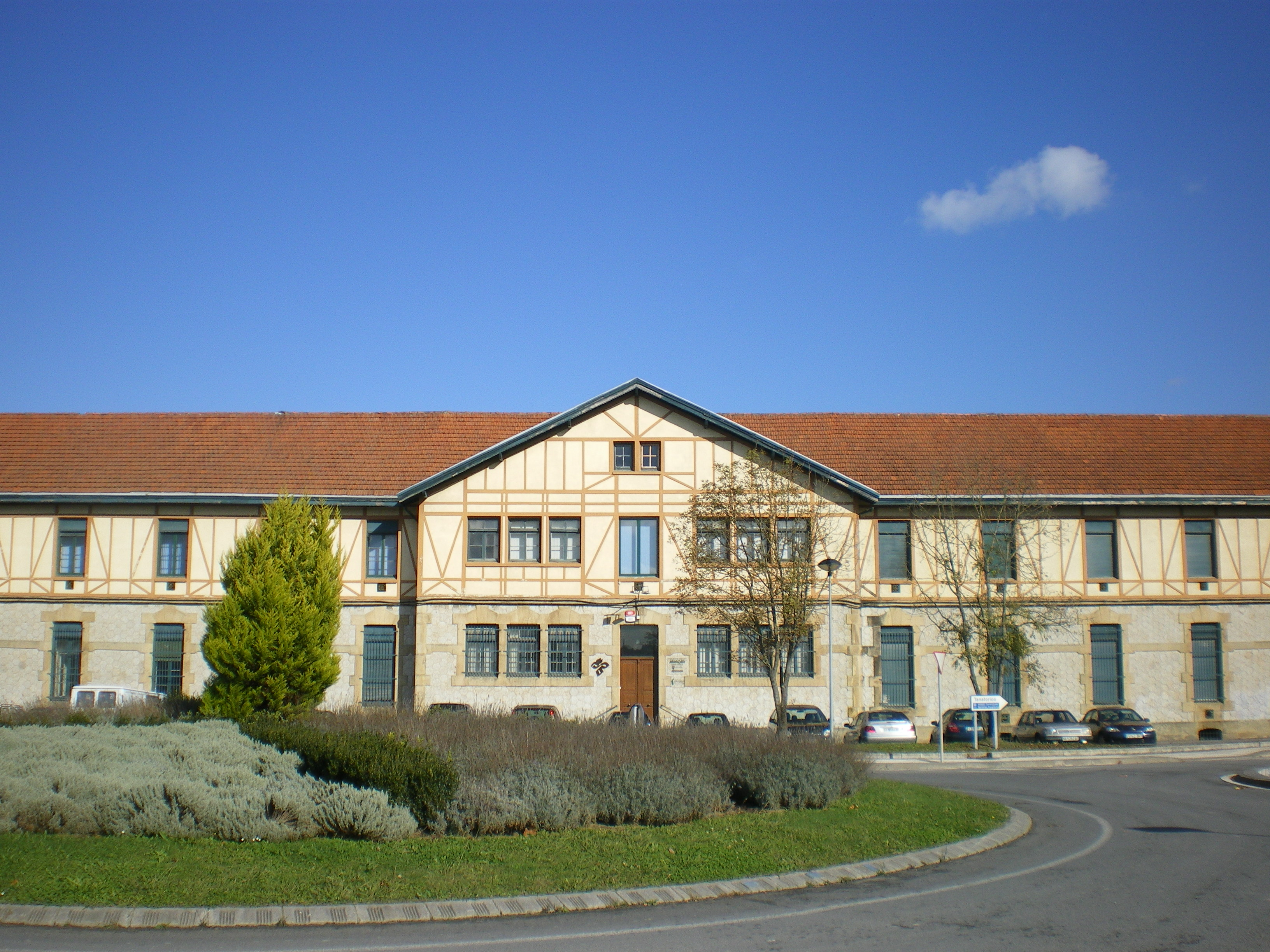 Fachada de la ubicación actual de la Sociedad de Ciencias Aranzadi en Zorroagagaina, 11